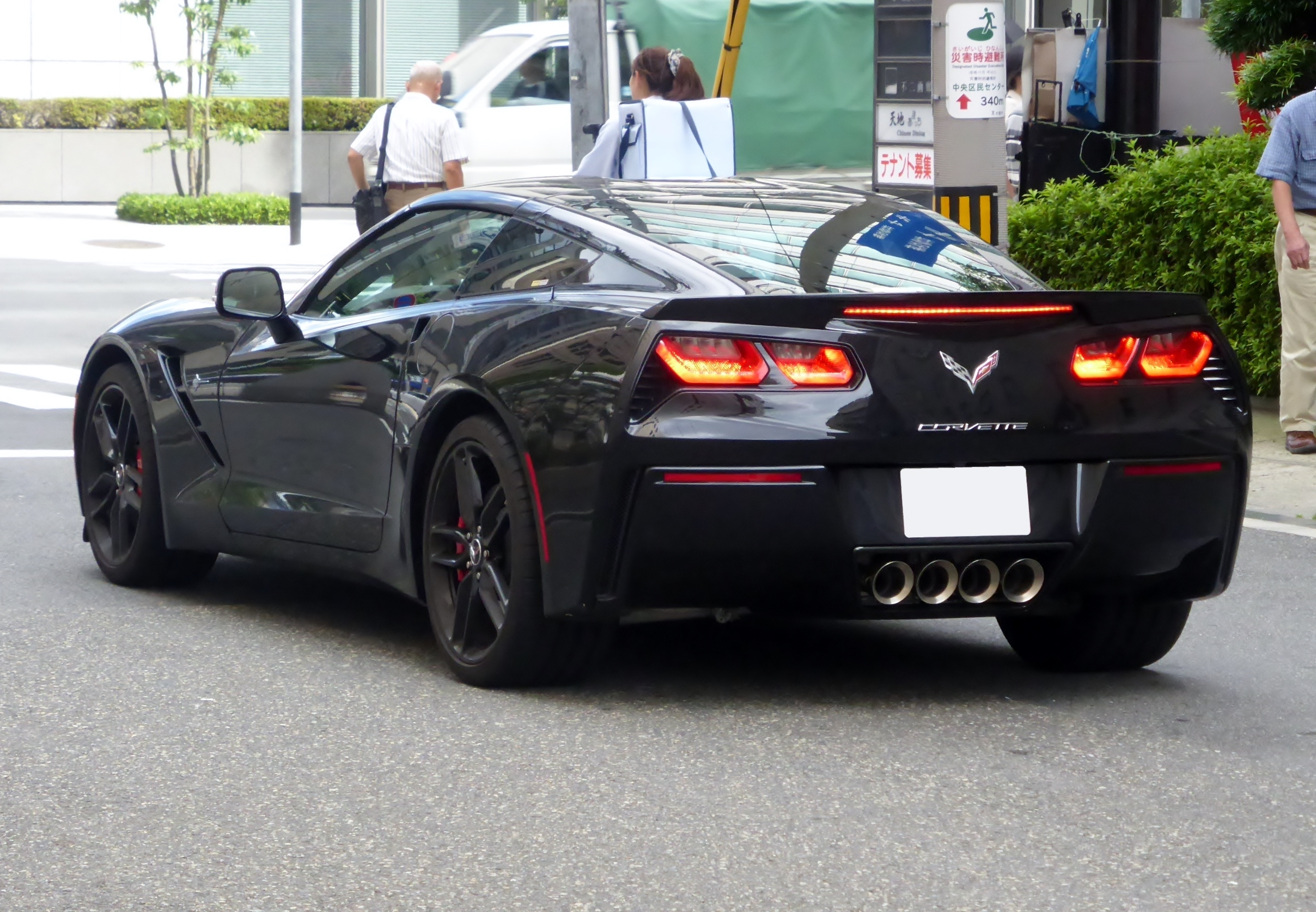 C7型シボレー・コルベットをリアから撮影。